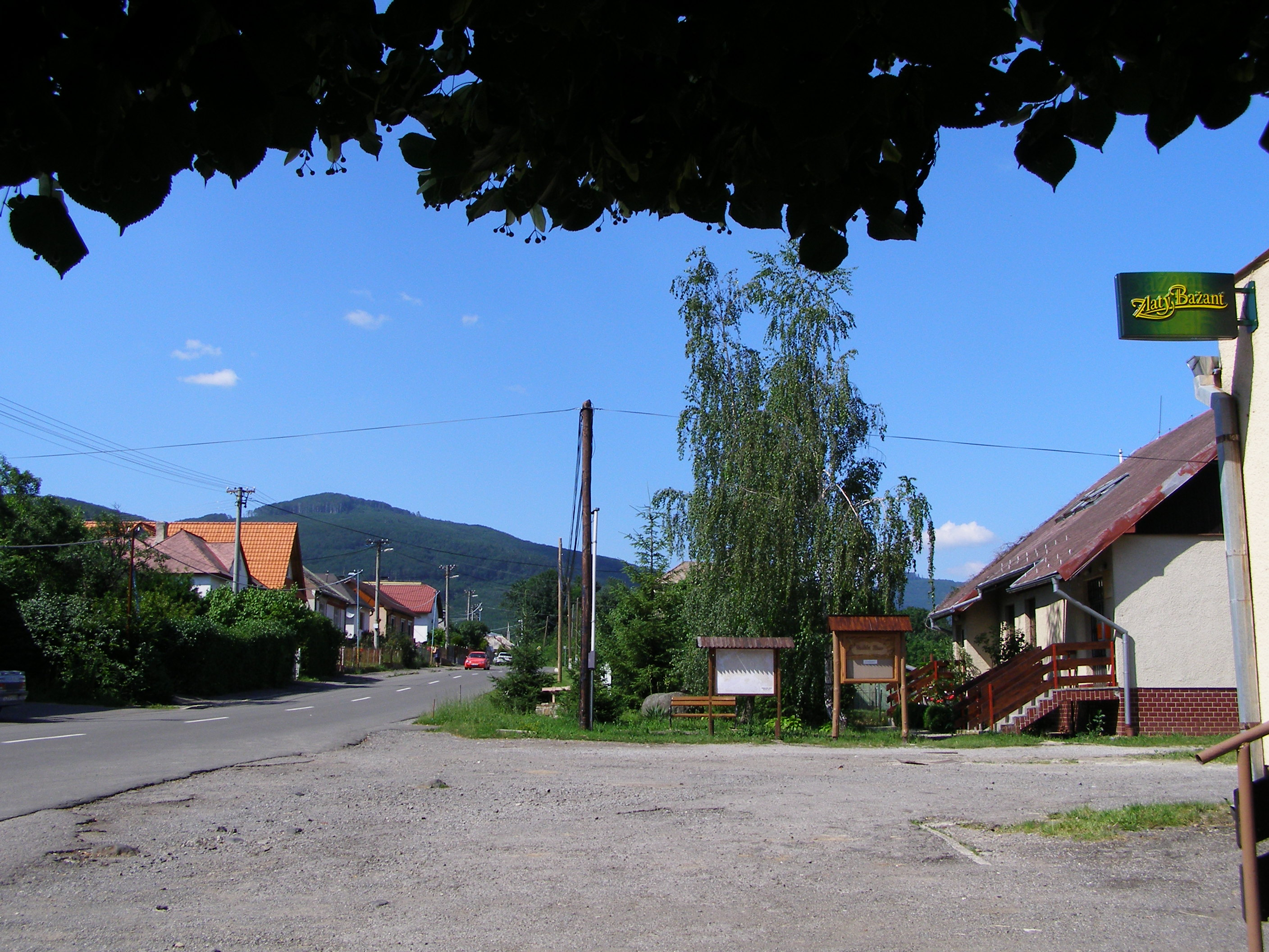 Remetské Hámre